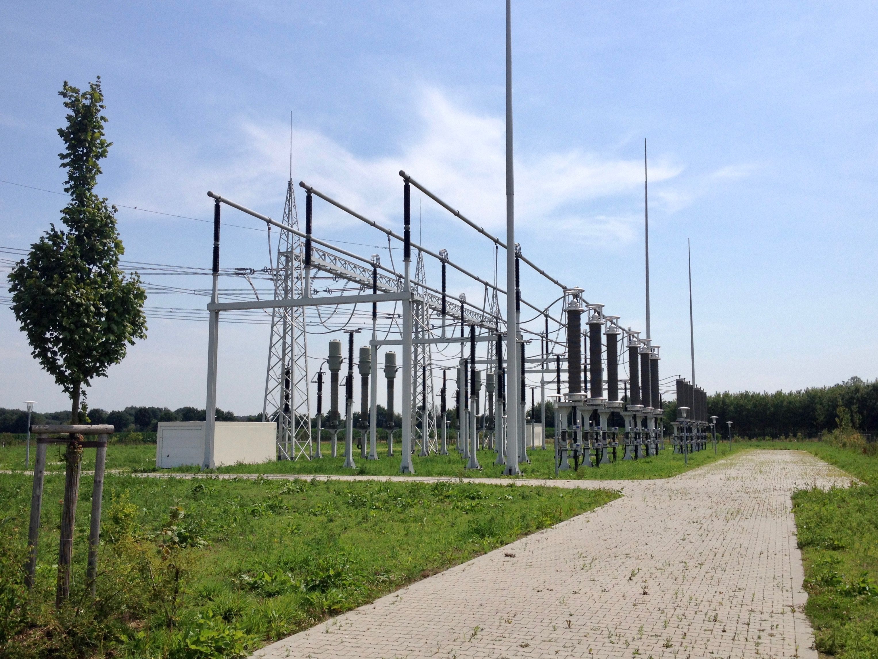 380-kV-Leitung Wesel–Meppen (Bl. 4201/KBl. 4230): Übersichtsbild der Kabelübergabestation Diestegge in Raesfeld